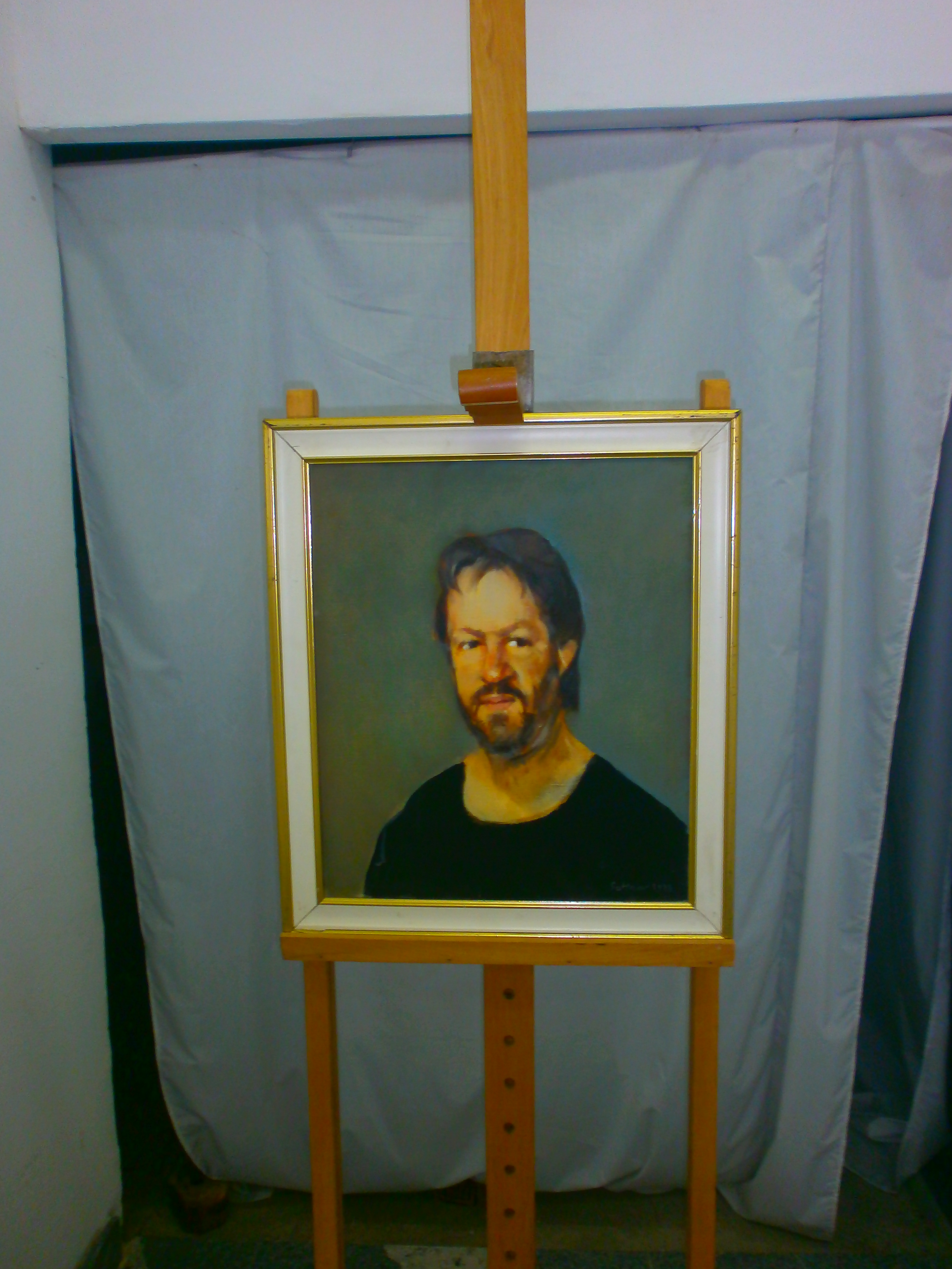 Srpski (latinica): Izložba radova Dimitra Ilijeva, Dimitrovgrad